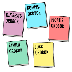 En illustrasjon til artikkelen om sjargong, bestående av ulike ordbøker som beskriver de ulike språkene en bruker i ulike situasjoner og relasjoner.